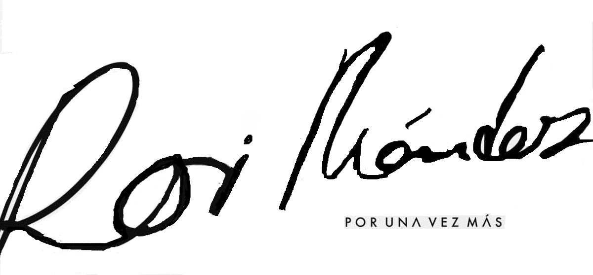 Fuente usada en la carátula de "Por Una Vez Más", sencillo de Roi Méndez (2018)